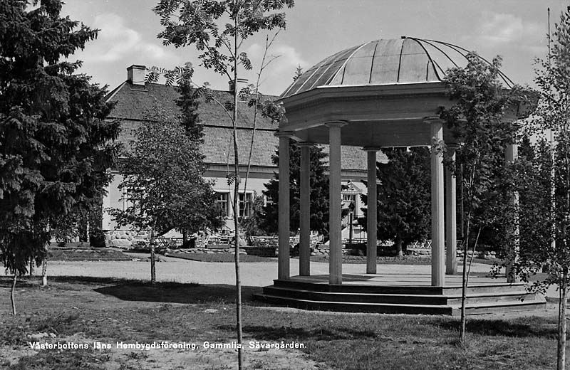 Sävargården, Gammlia.; Bruksherrgård; Byggnadsverk; Slott och herrgårdar